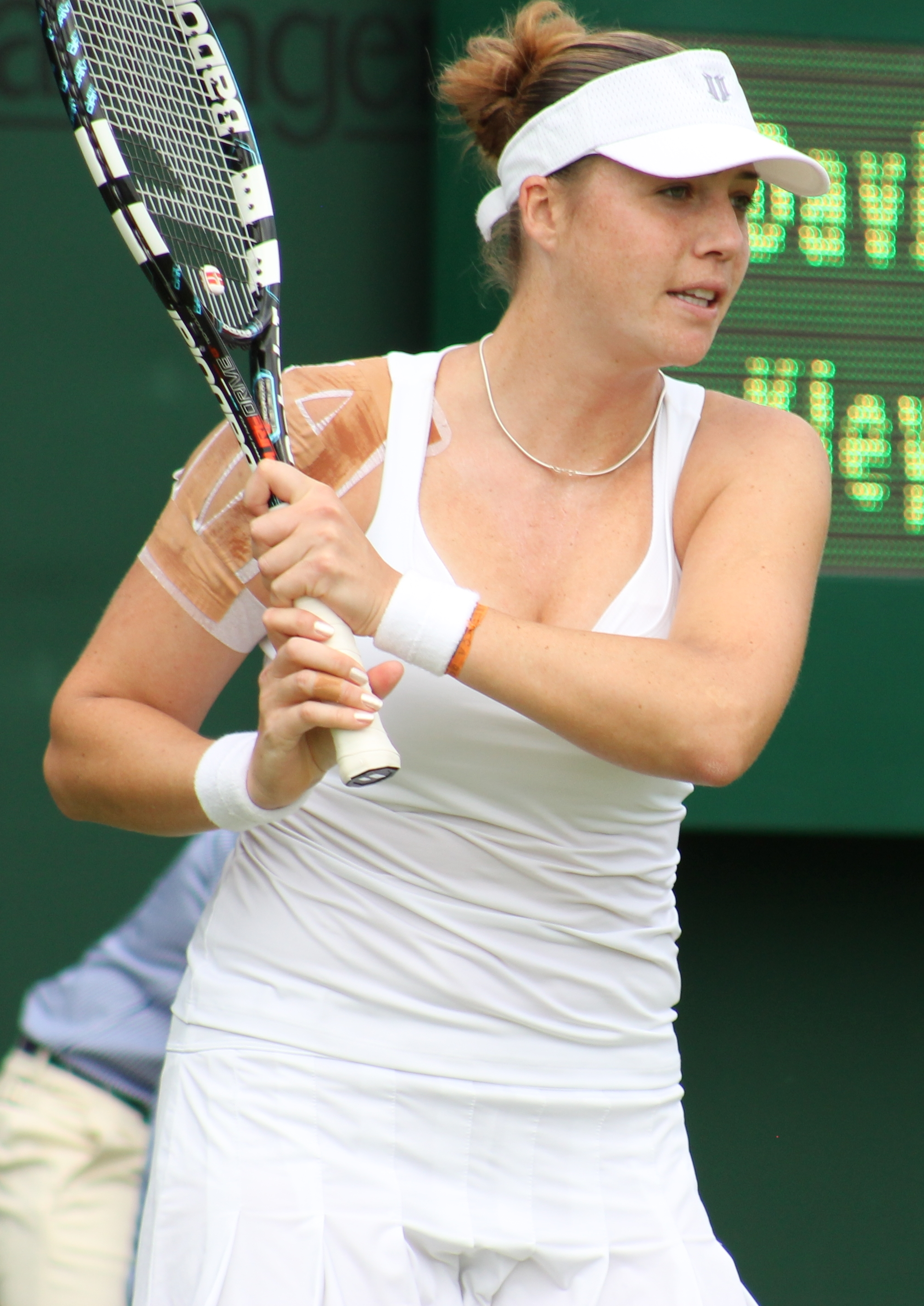 Kleybanova WM14 (33)